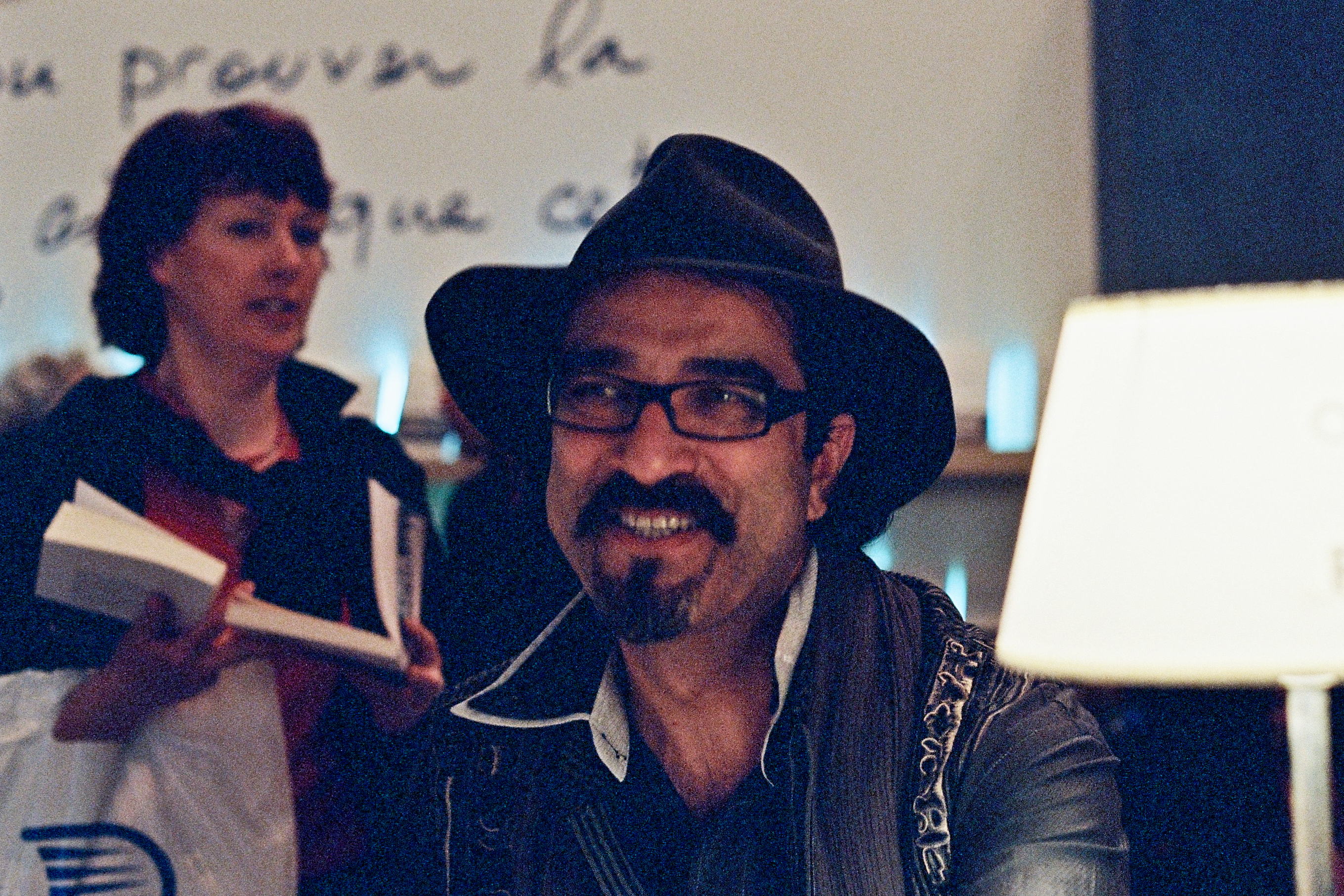 Atiq Rahimi au salon du livre 2009